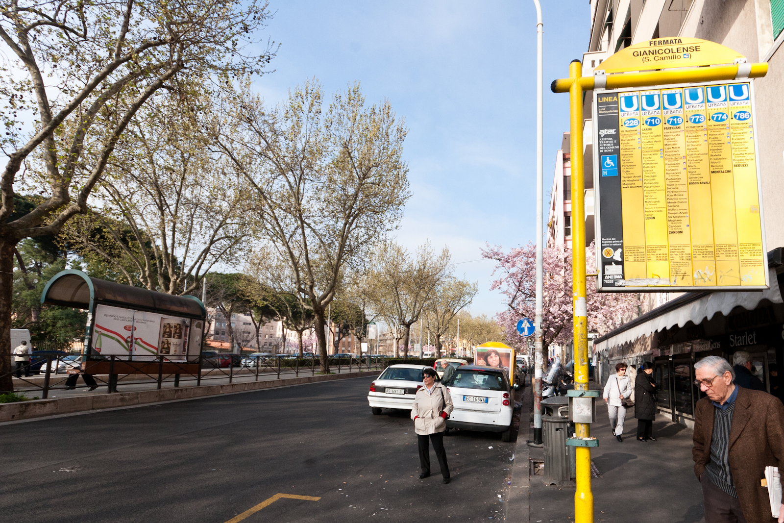 Circonvallazione Gianicolense, Rome, Italy